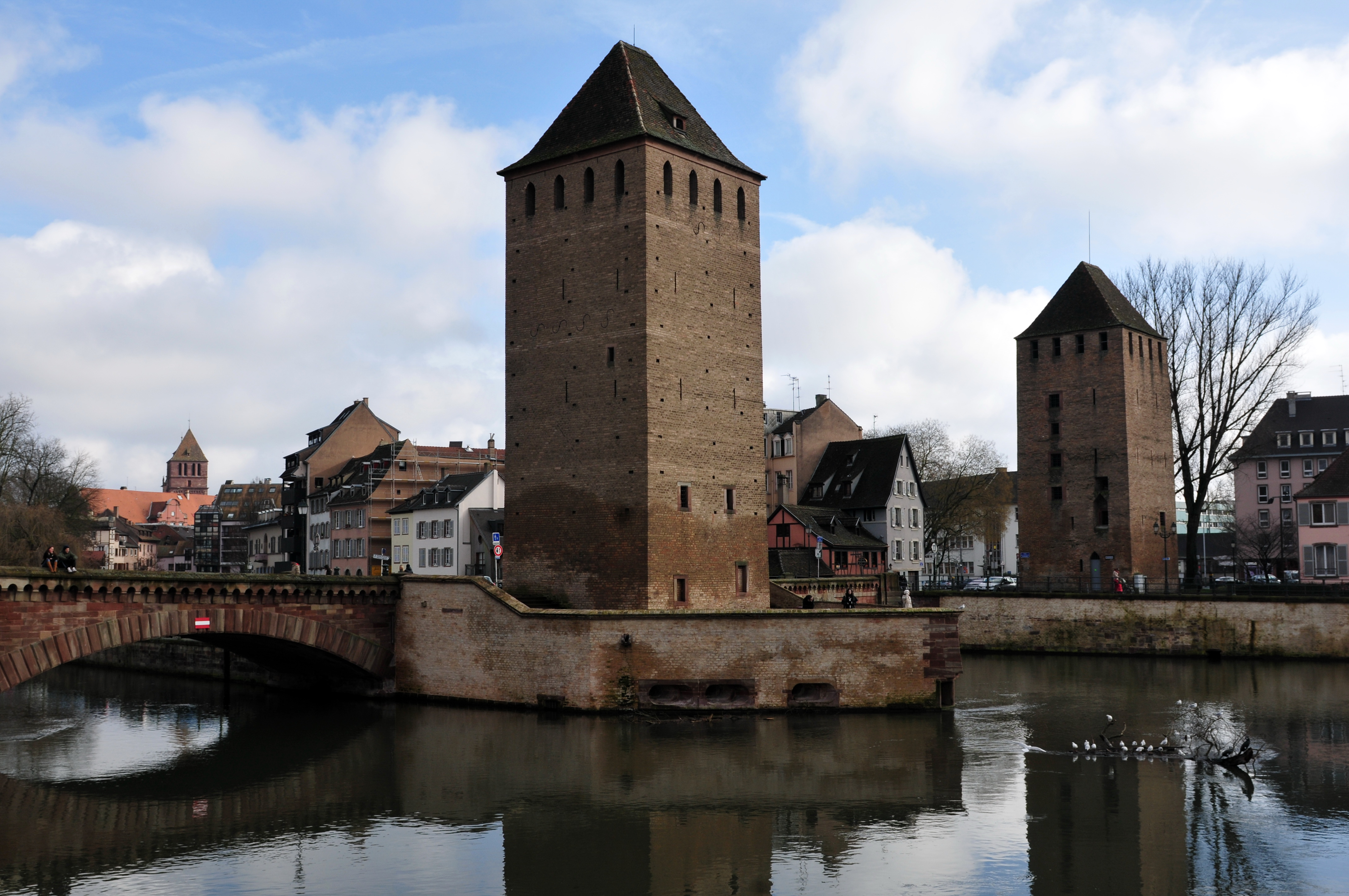 Straßburg European Parliament 2014 3.–7. February 2014, StrasbourgThis photo has been created within the project "WIKI loves parliaments / European Parliament". Usage and Help If you have any questions concerning this picture or how to use it, feel free to